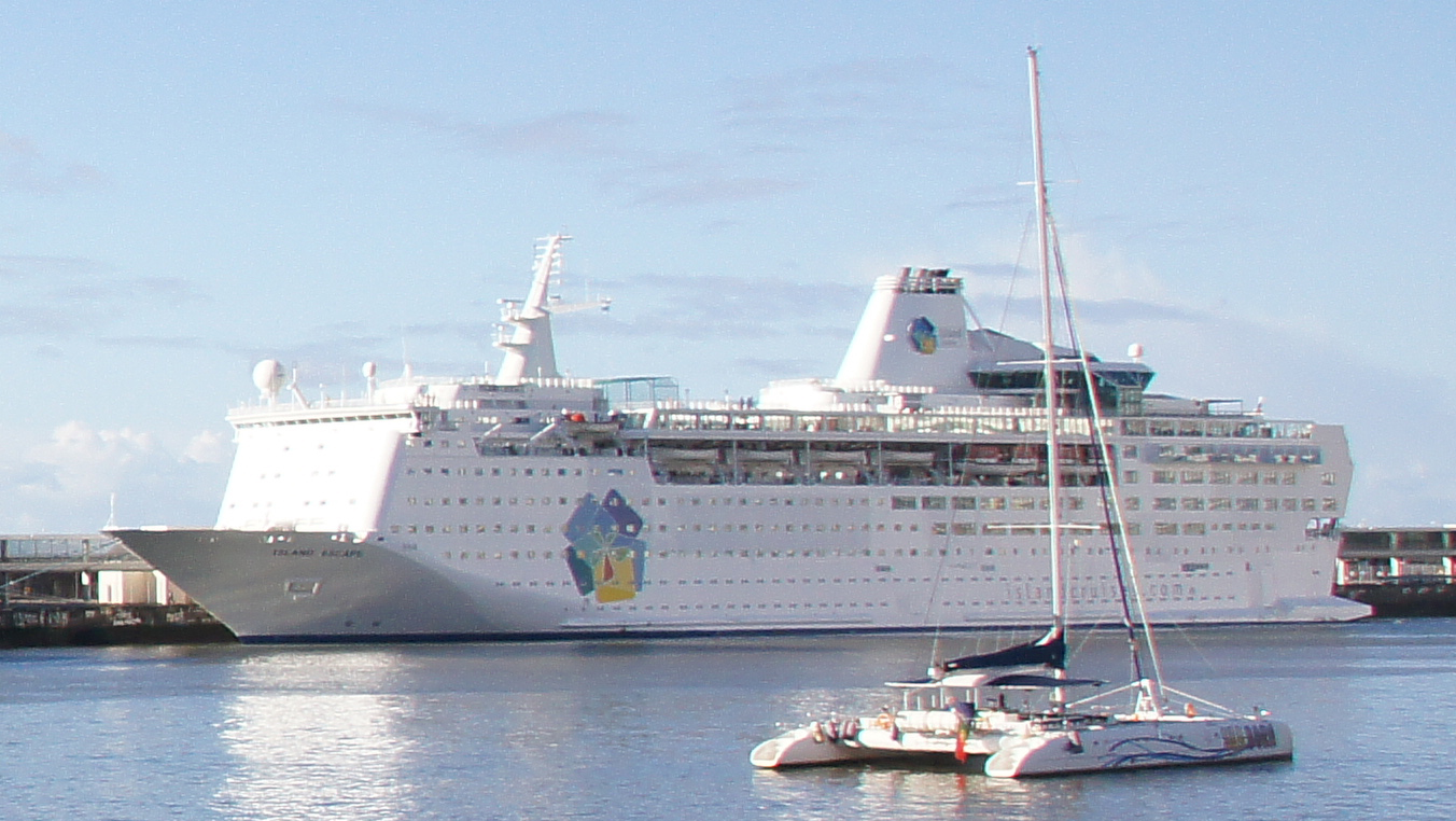 Porto do Funchal